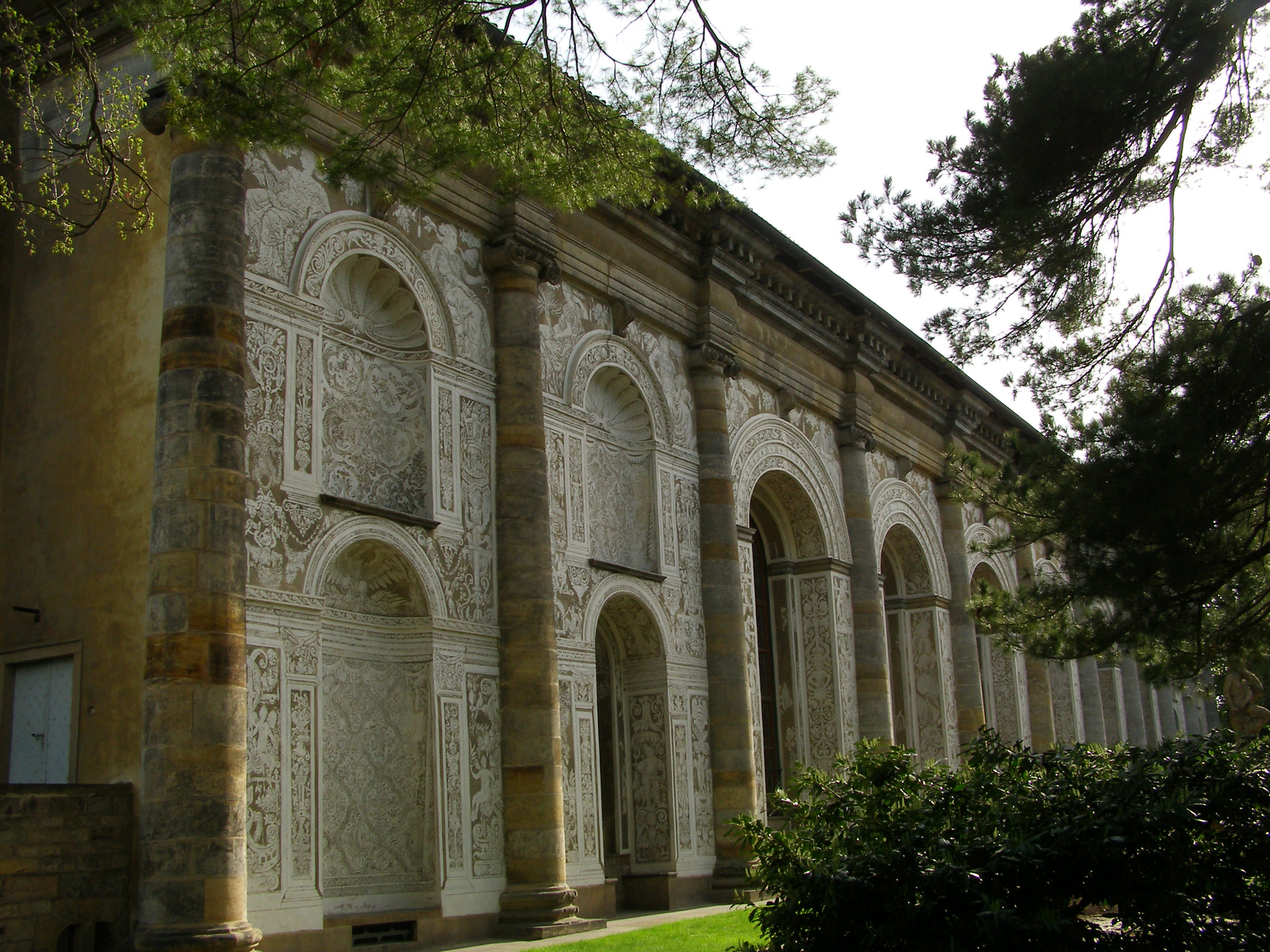 Pražský hrad, Praha 1-Hradčany